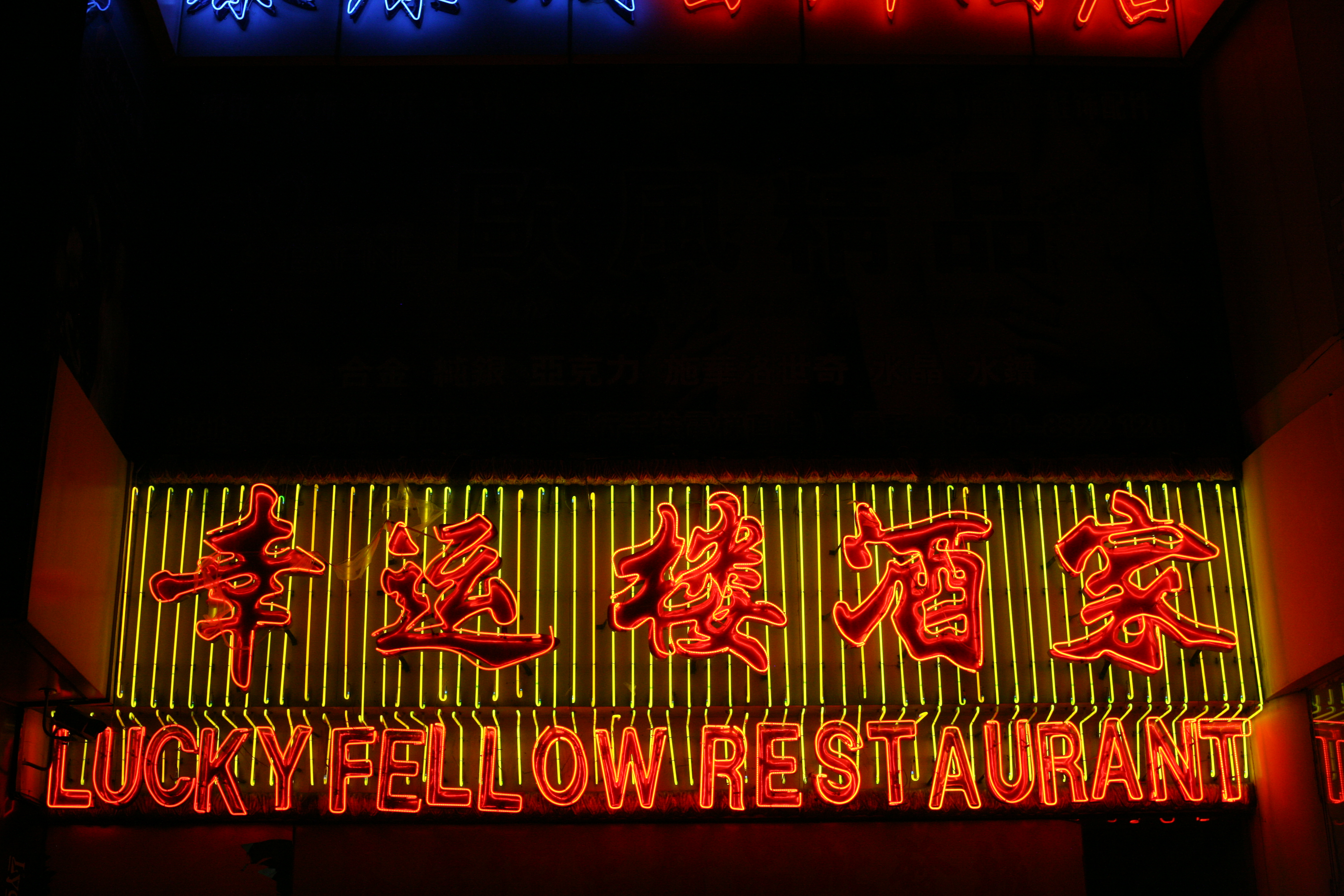 粵語: 廣州幸運樓酒家霓虹招牌